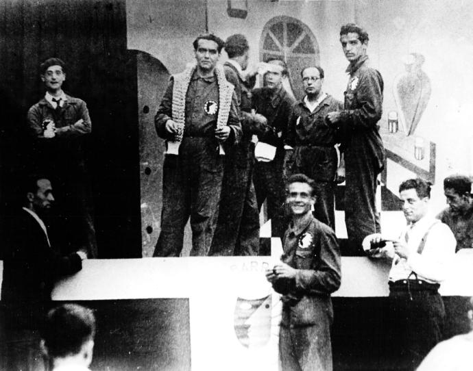 Federico García Lorca e outros membros de La Barraca, en Vigo, en agosto de 1932, no desaparecido parque de Cabanas